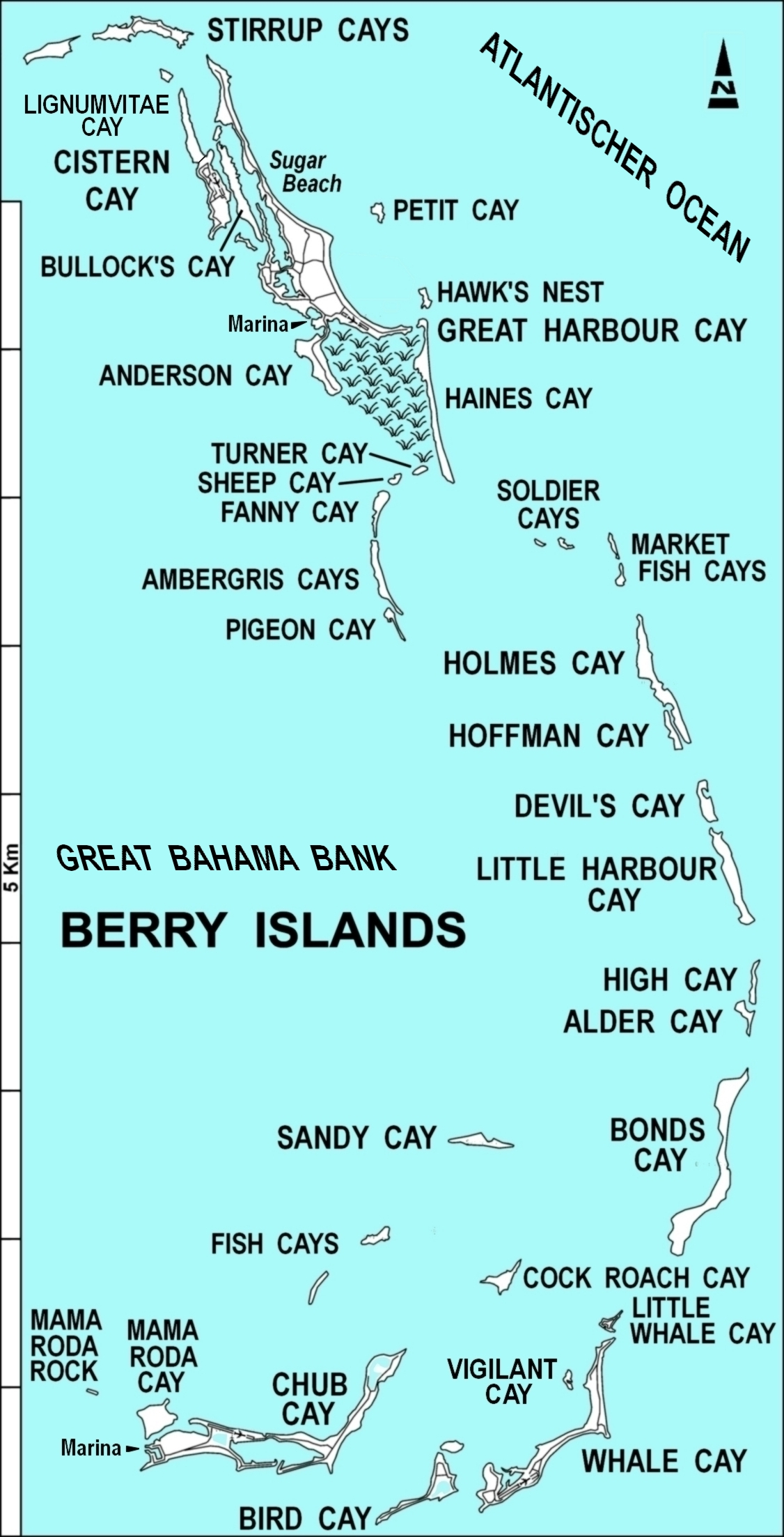 Übersichtskarte der Berry Islands